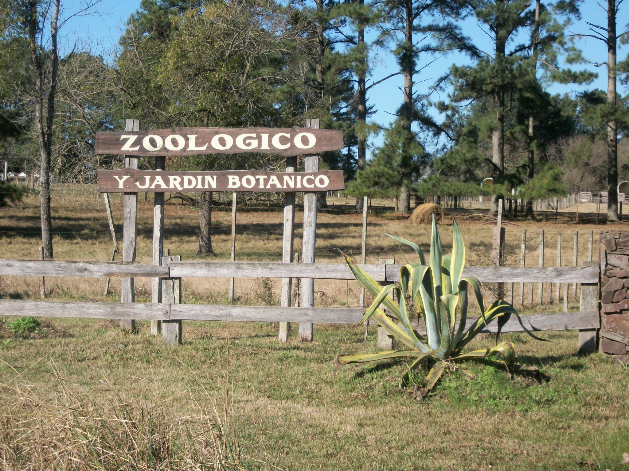 Entrada al Zoológico